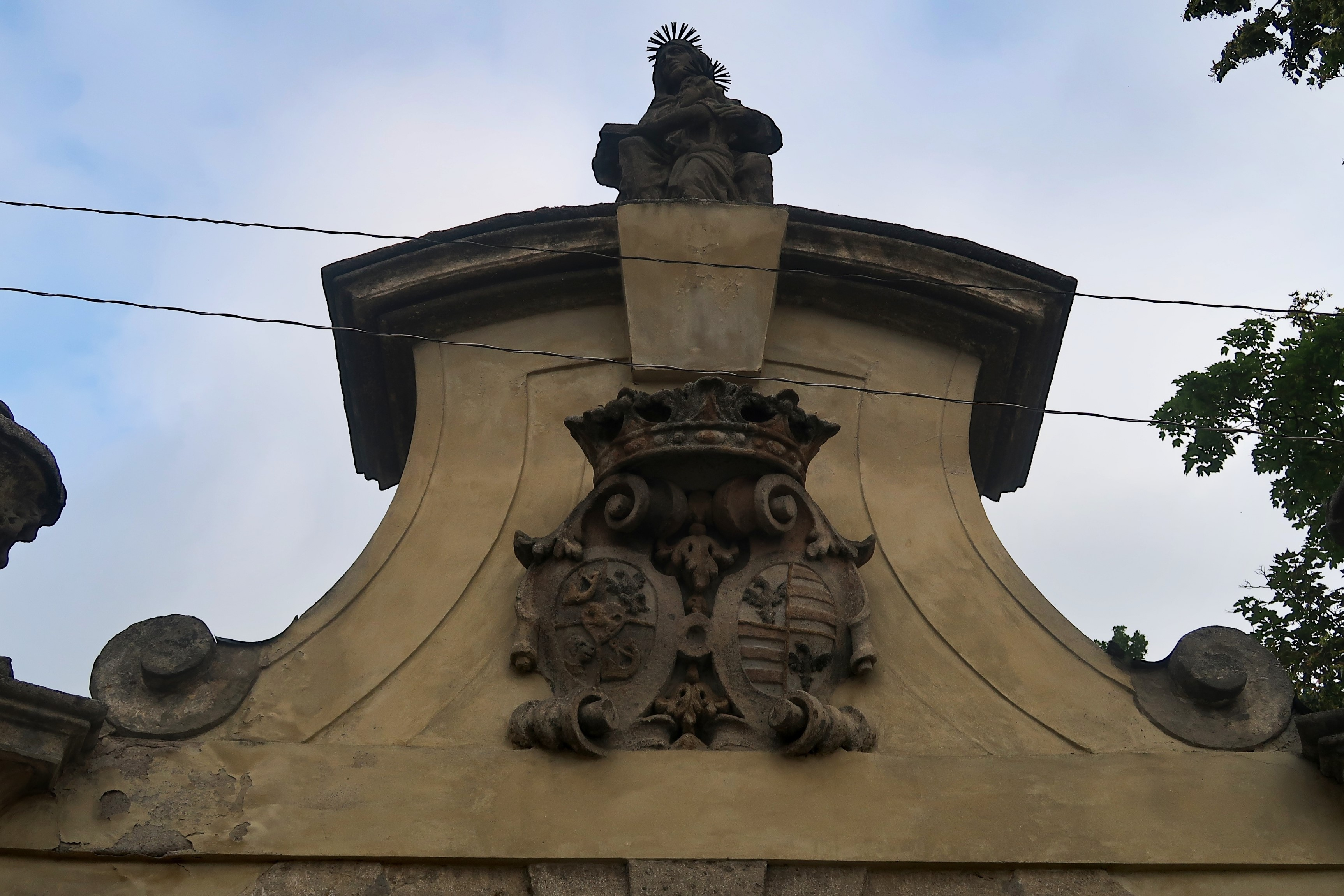 Erb Bernarda Františka Věžníka a jeho manželky Johany, rozené Švihovské z Rýzmberka